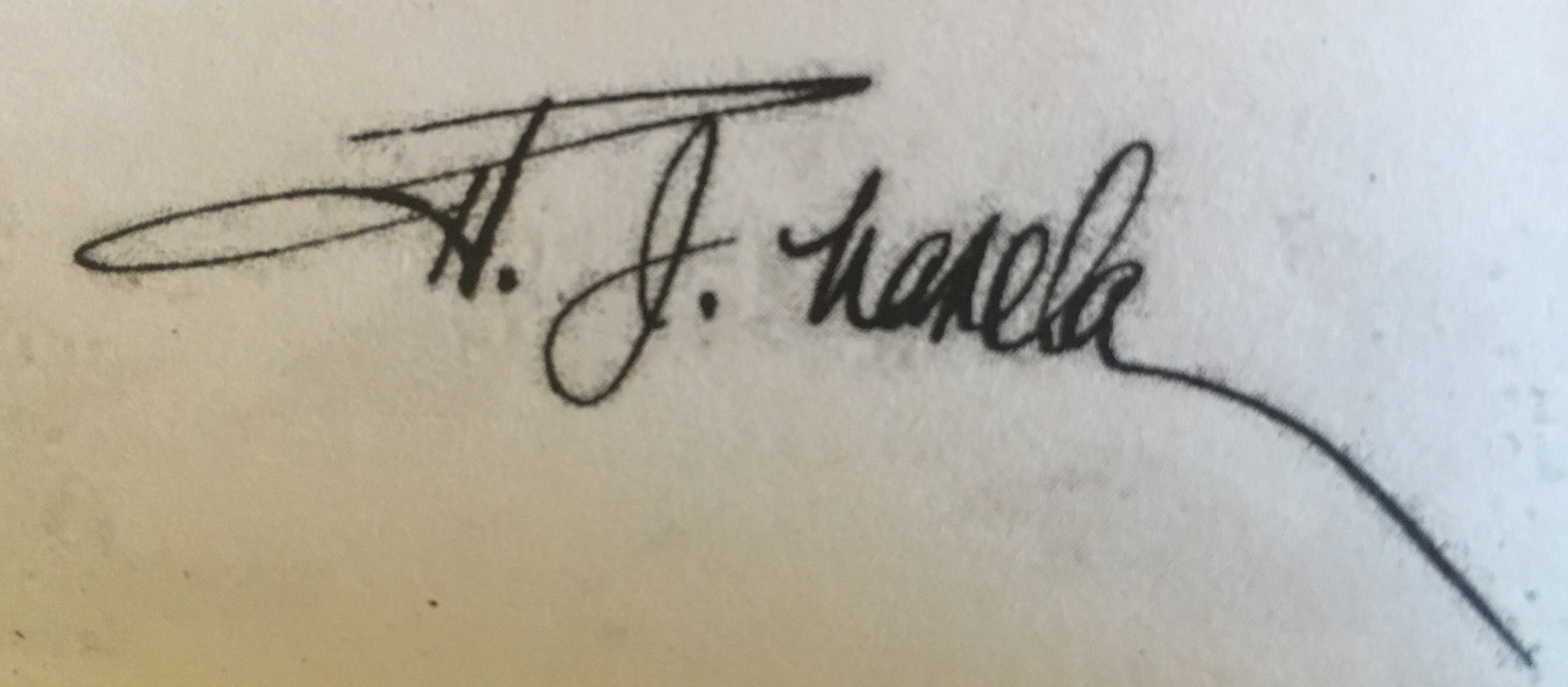 Firma Horacio José Varela